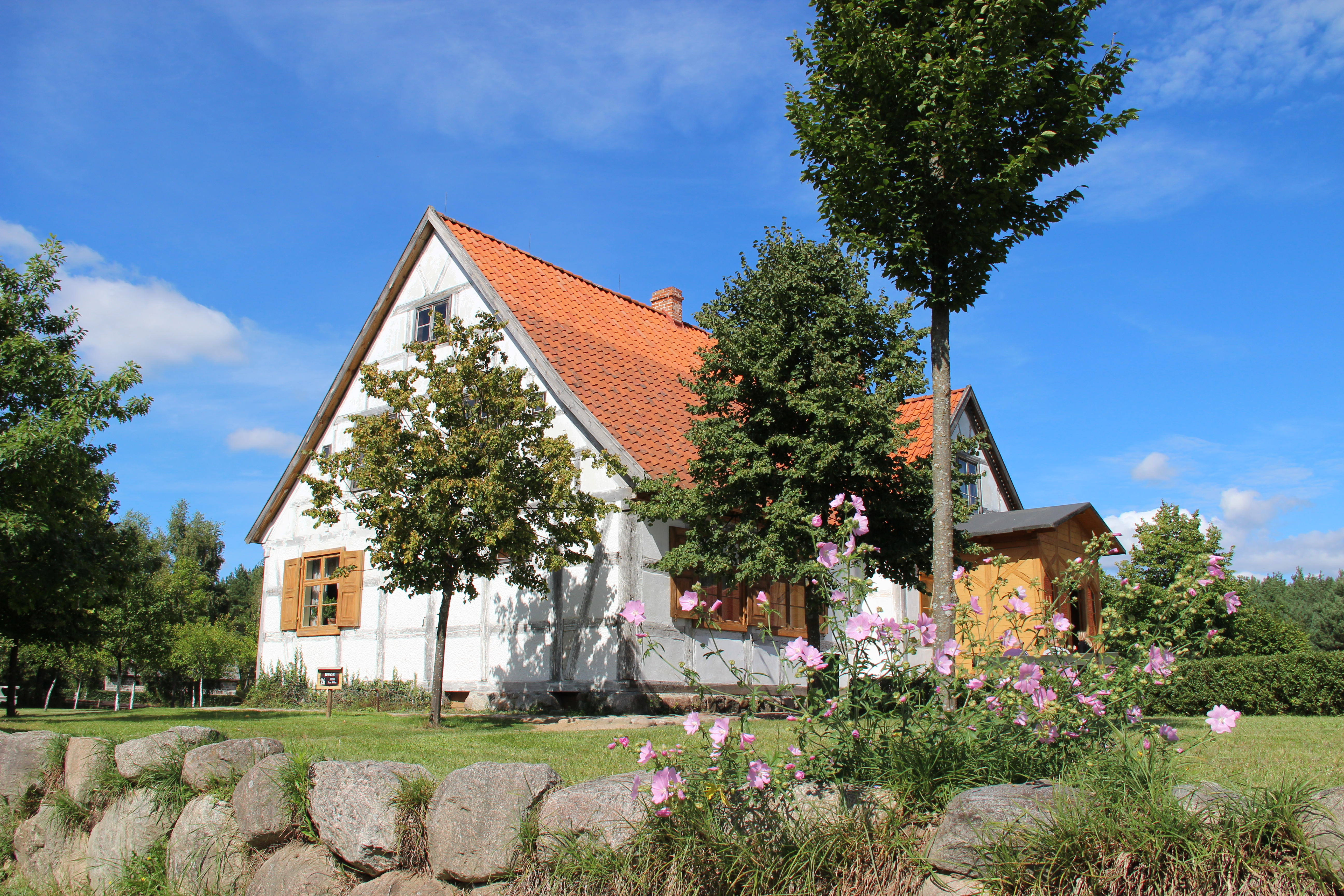 Wdzydze Kiszewskie - dworek pochodzący z Luzina